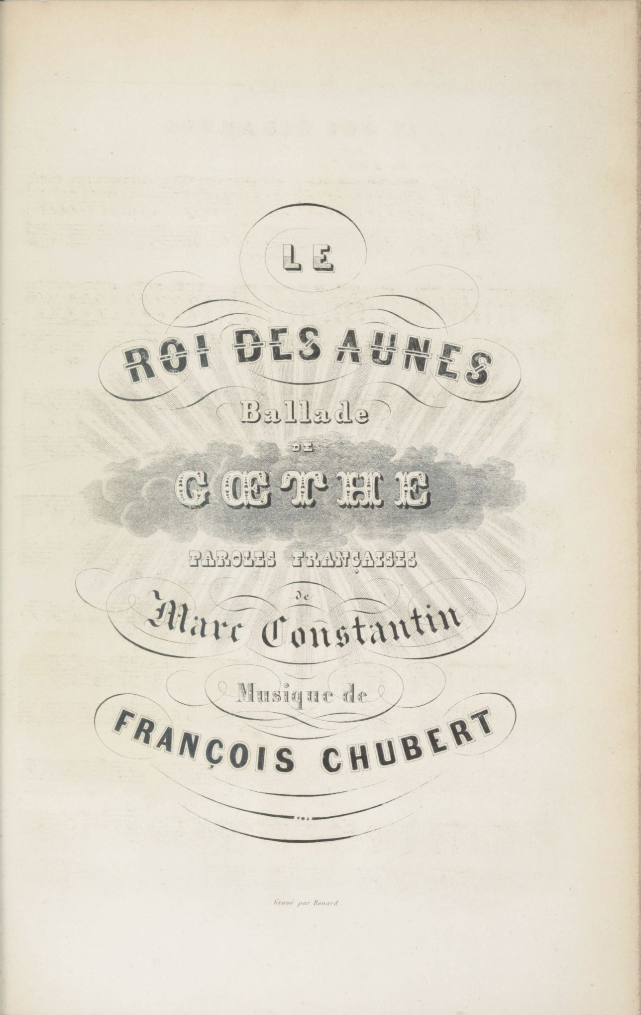 Couverture d'une édition du Roi des Aunes en français.